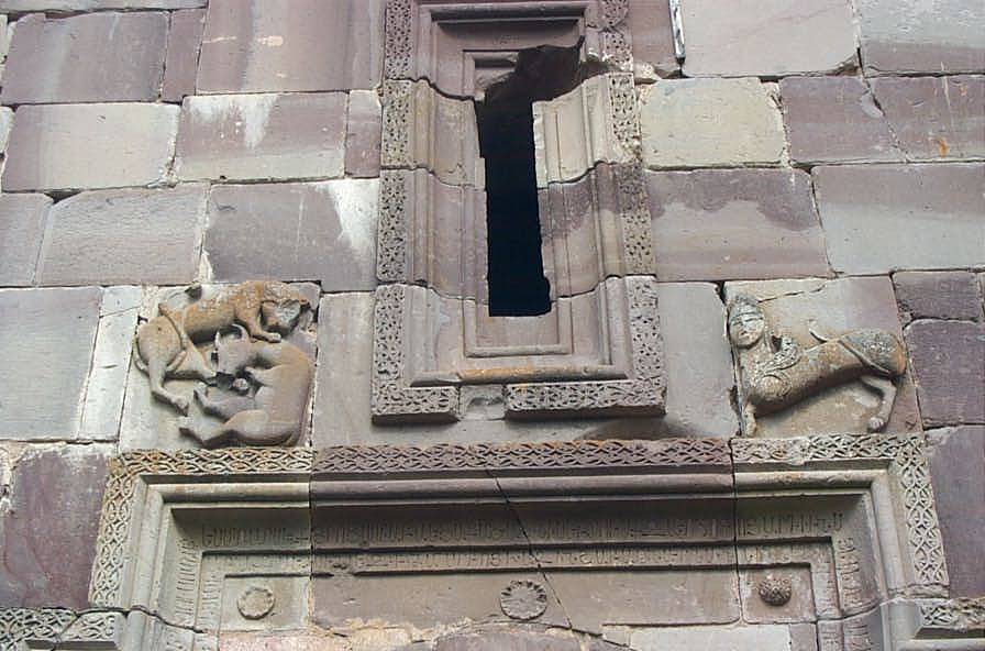 Makaravank Monastery in Armenia.